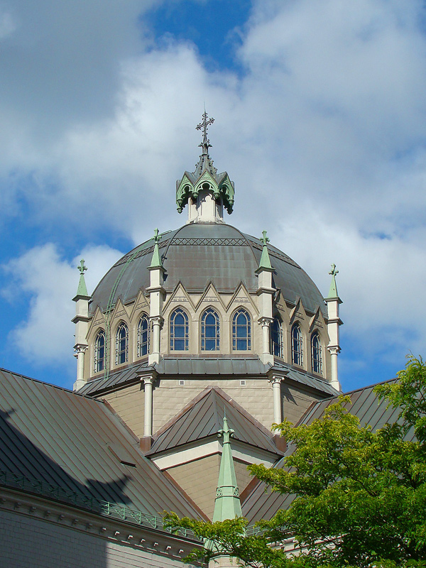 Cocathédrale Saint-Antoine-de-Padoue, Longueuil, Montérégie, Québec, Canada.